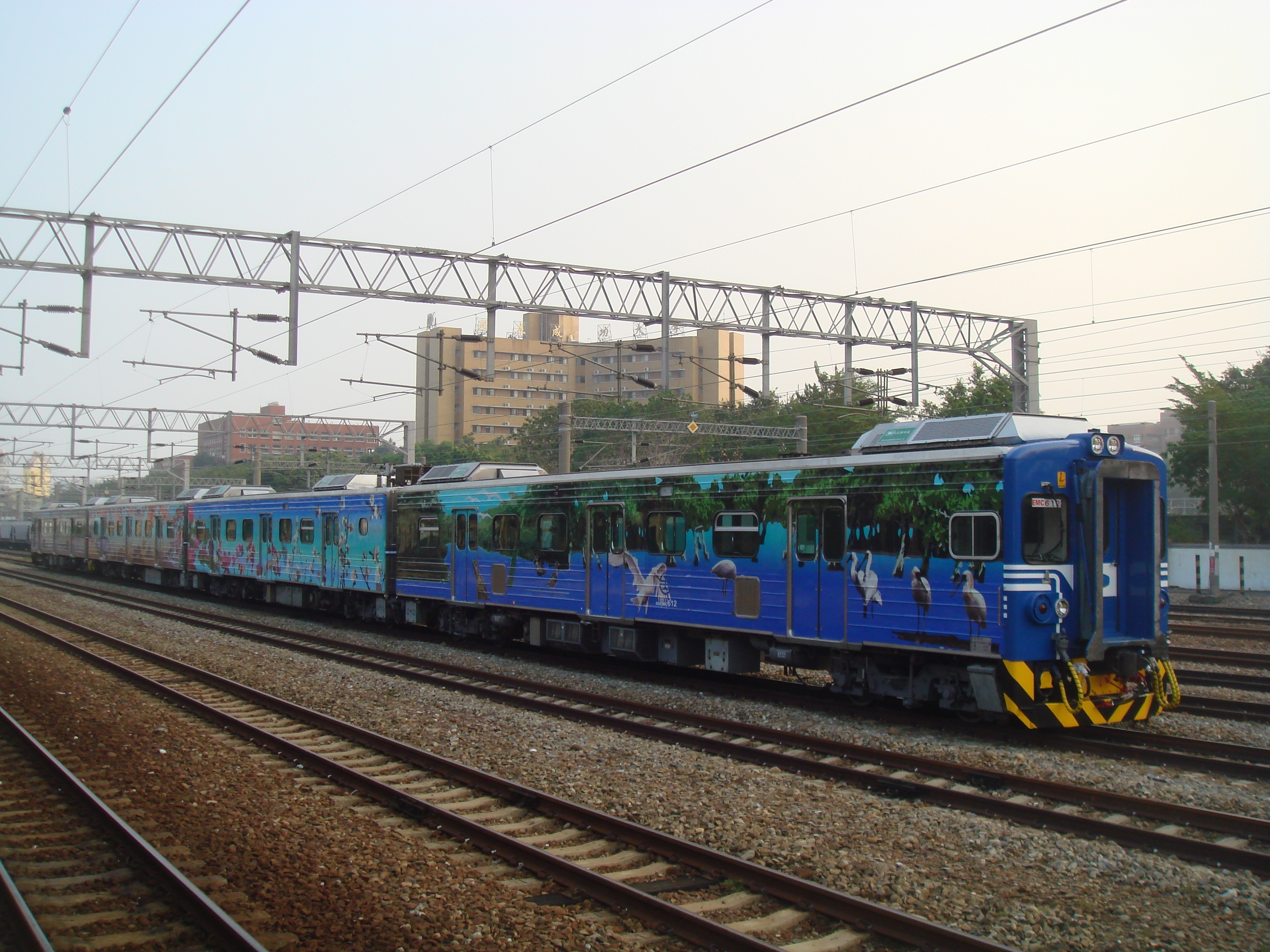 行駛沙崙線的臺鐵EMU600型彩繪電聯車EMU612。臺鐵宋科長拍攝及贈送，允許以CC狀態呈現。